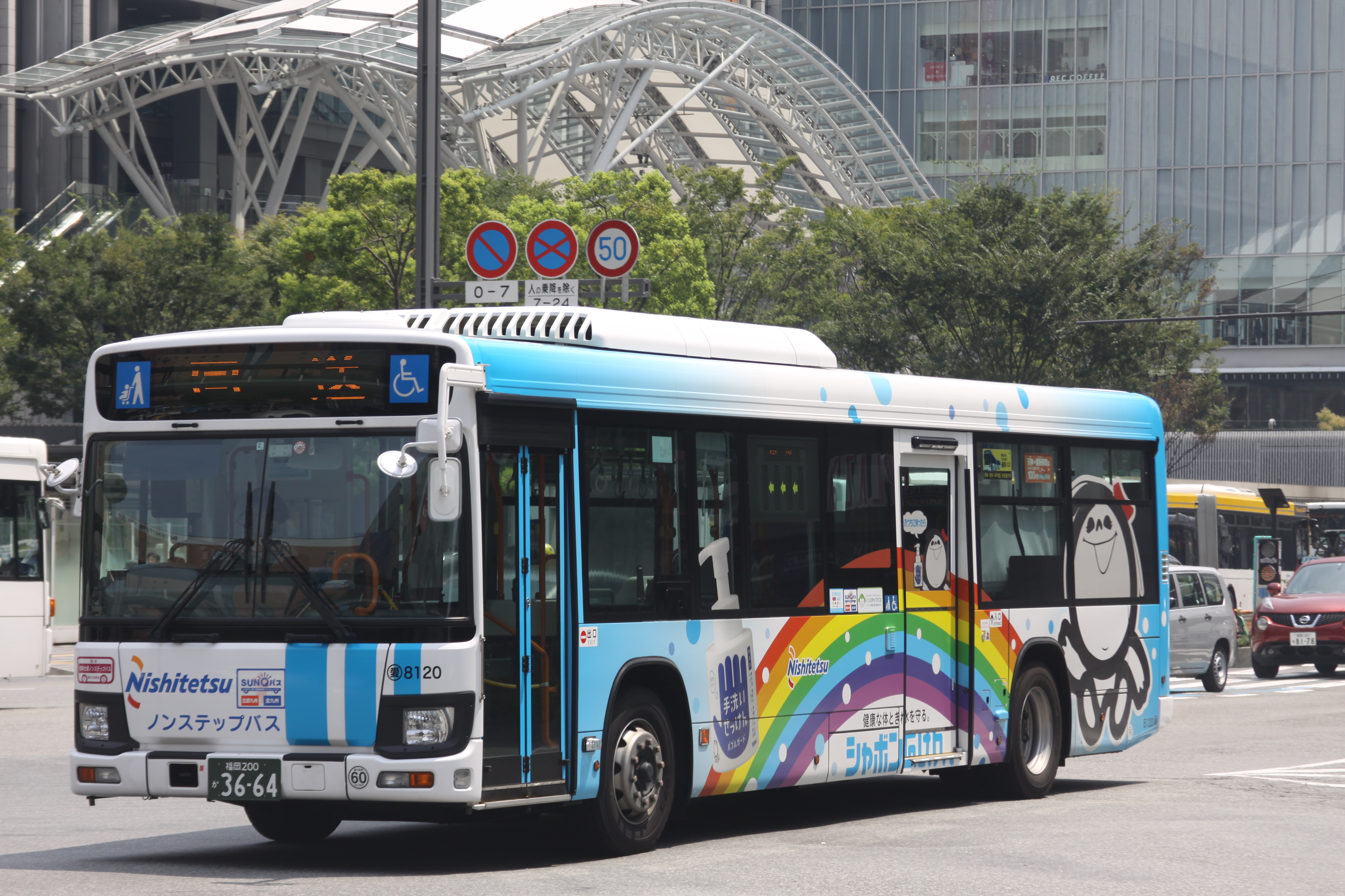 西鉄バス8119号車